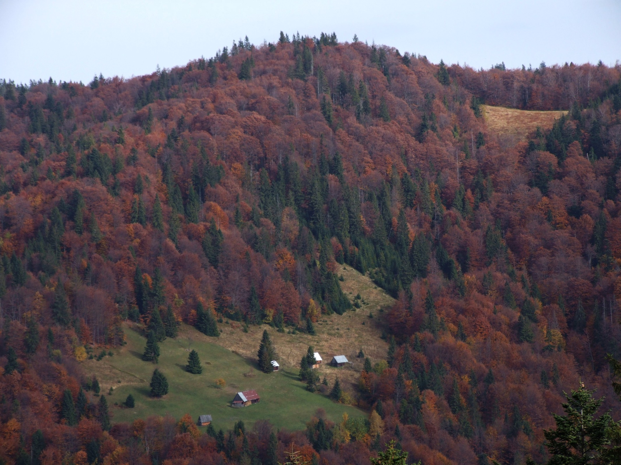 Polana Centyrz pod Wysznią w Gorcach